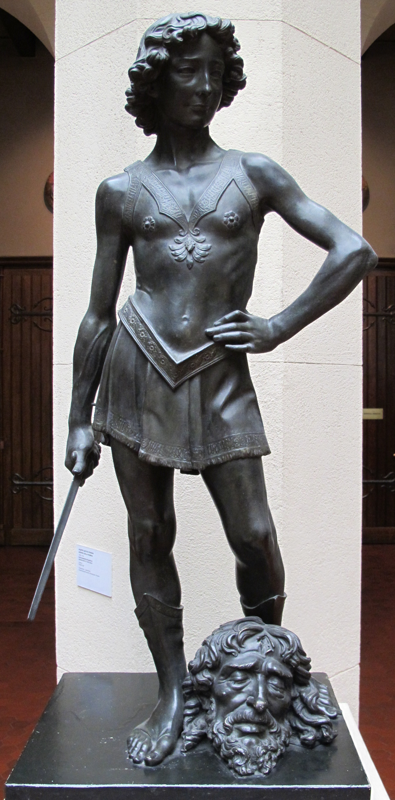 Museo pushkin, calchi, verrocchio, david